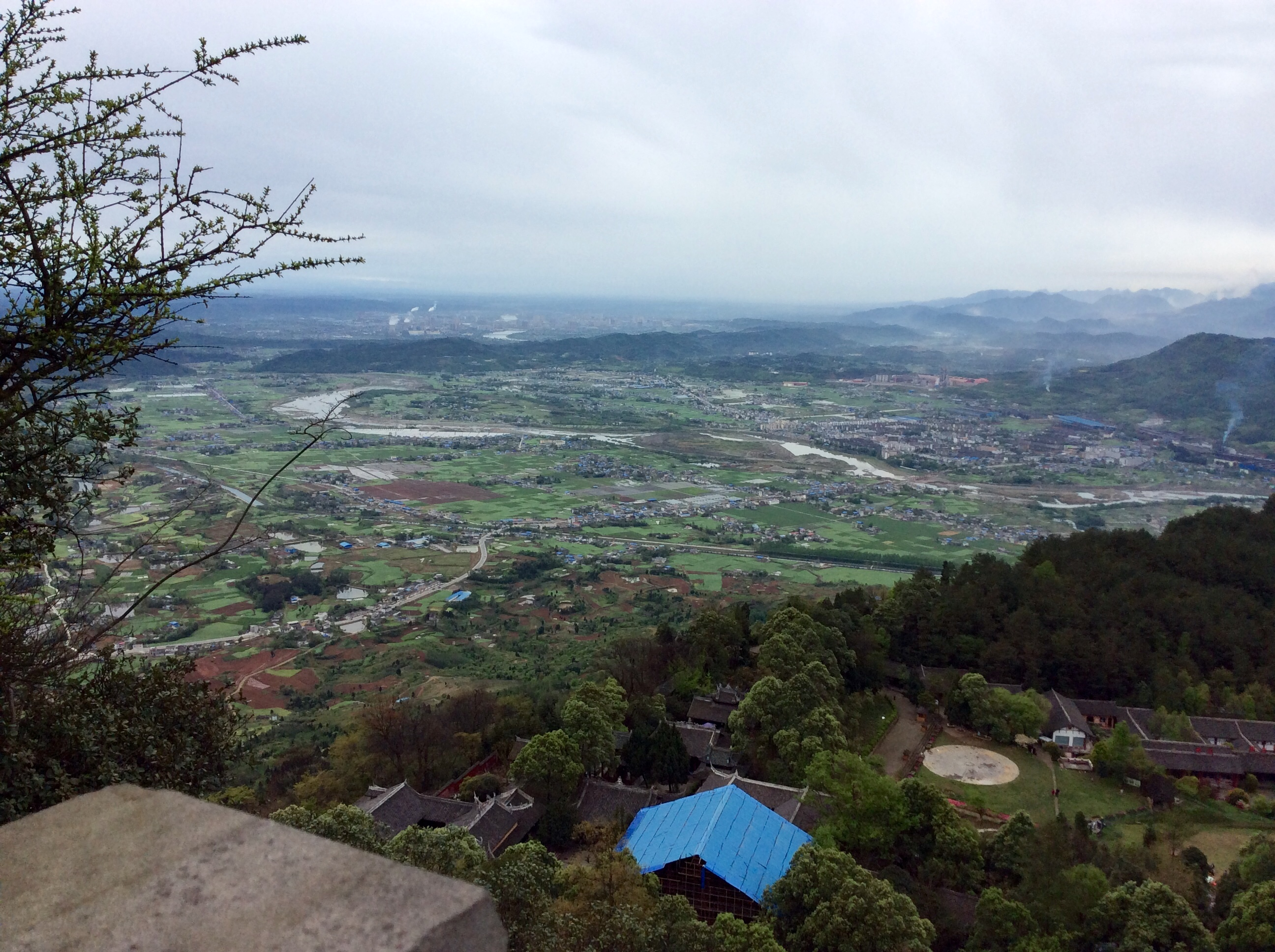 自窦团山望见的江油市武都镇风光